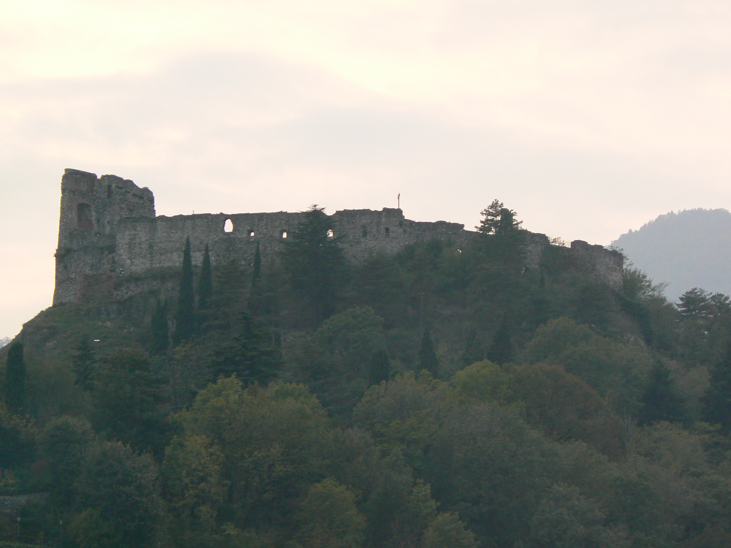 Panoramica del Castello di Avigliana